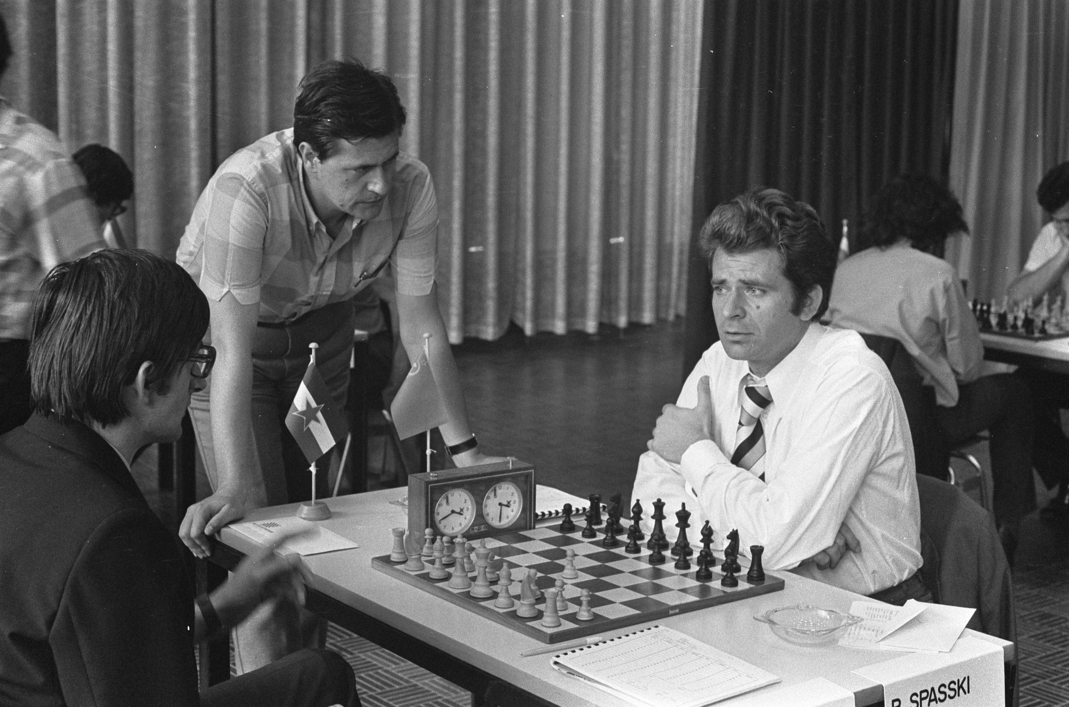 Collectie / Archief : Fotocollectie Anefo Reportage / Serie : [ onbekend ] Beschrijving : IBM-schaaktoernooi, Planinc en Spasski (rechts) met wedstrijdleiding Datum : 2 augustus 1973 Locatie : Amsterdam, Noord-Holland Trefwoorden : schaken, sport Persoonsnaam : Planinc, Spassky, Boris Fotograaf : Punt, […] / Anefo Auteursrechthebbende : Nationaal Archief Materiaalsoort : Negatief (zwart/wit) Nummer archiefinventaris : bekijk toegang 2.24.01.05 Bestanddeelnummer : 926-5874